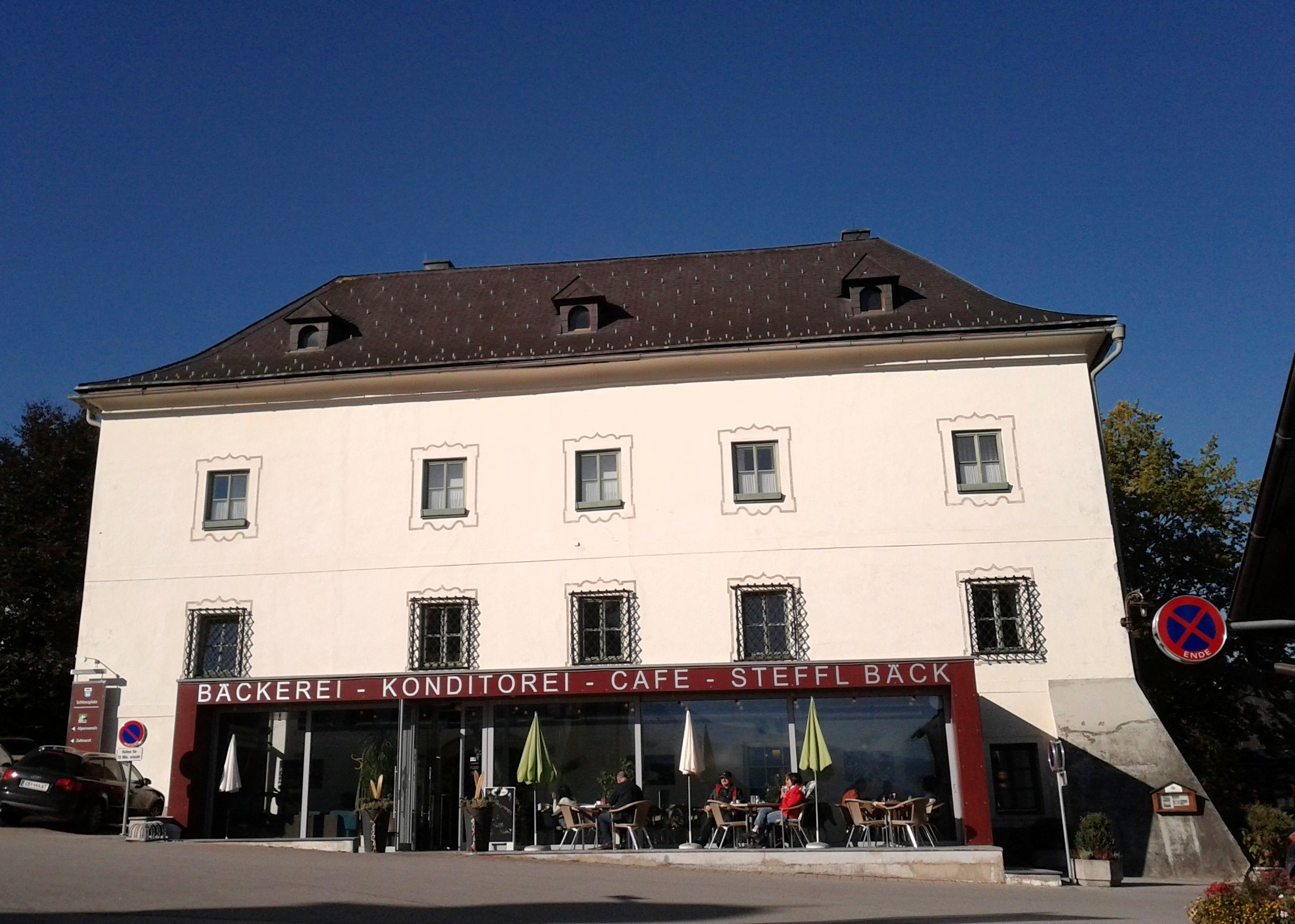 Ehem. Schloss